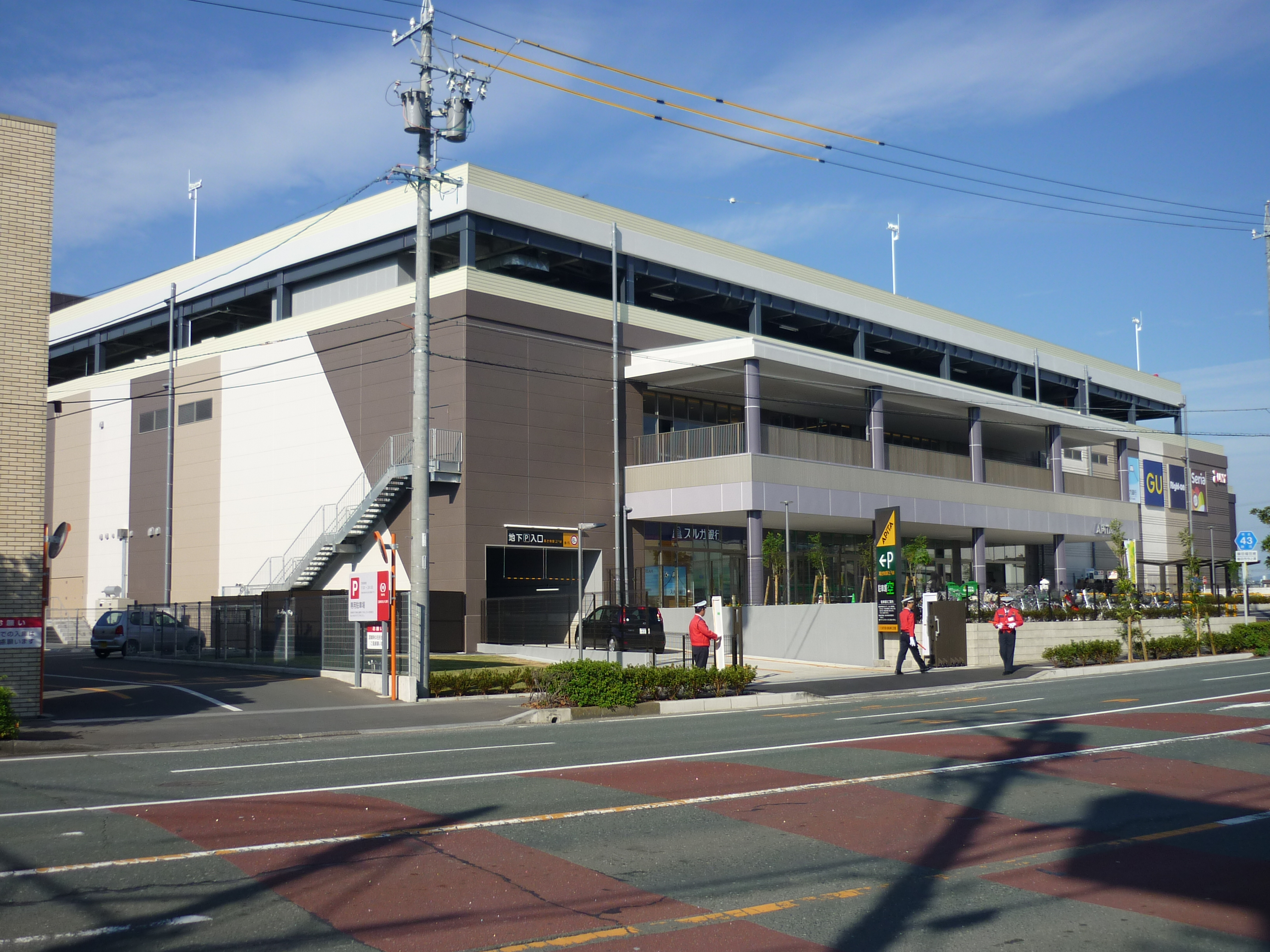 アピタ磐田店外観